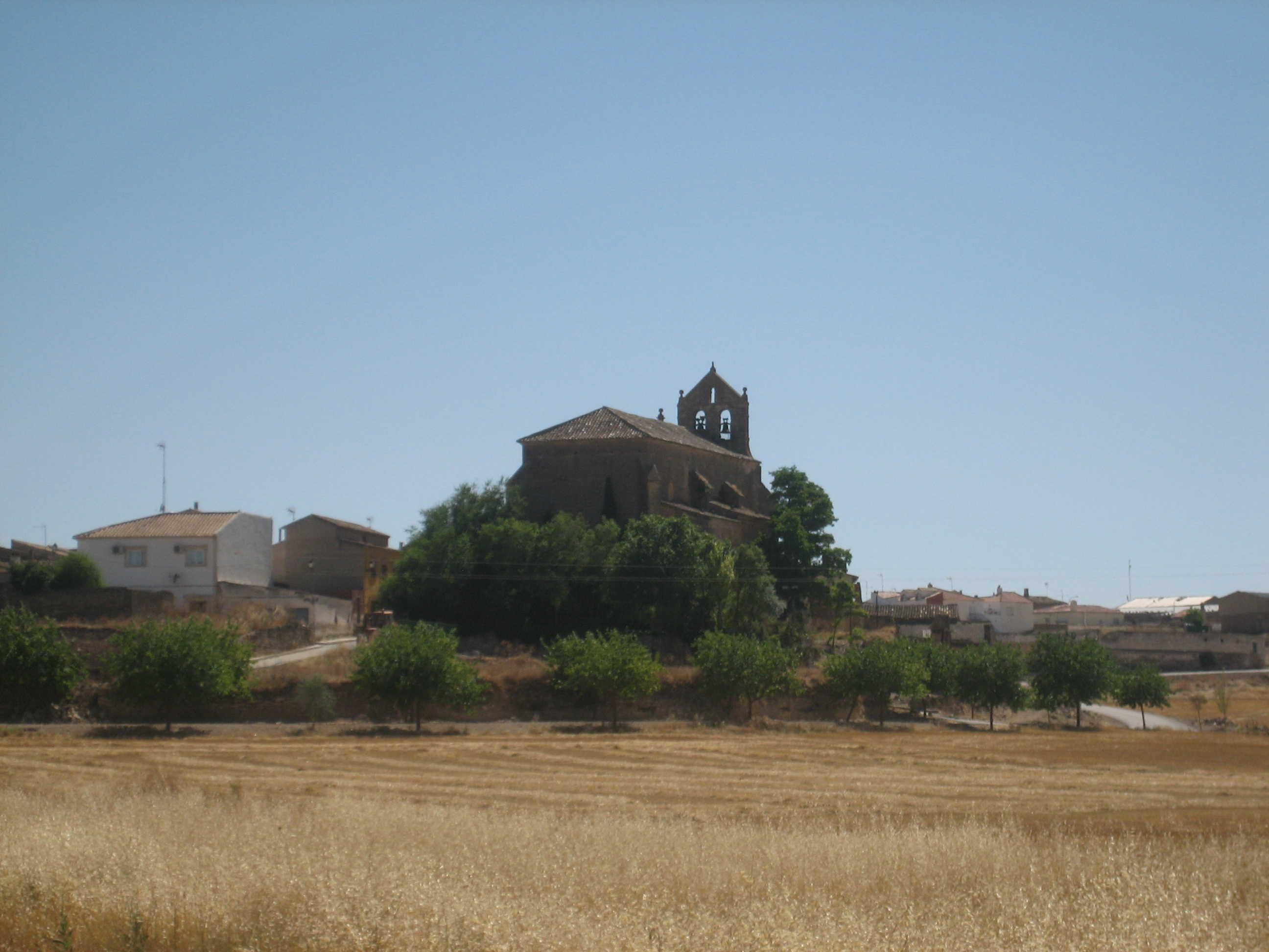 Vista desde el llano de la Iglesia de la Asunción de Nuestra Señora de Tébar